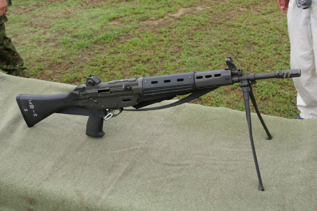 89式5.56mm小銃金沢駐屯地創立57周年記念行事にて